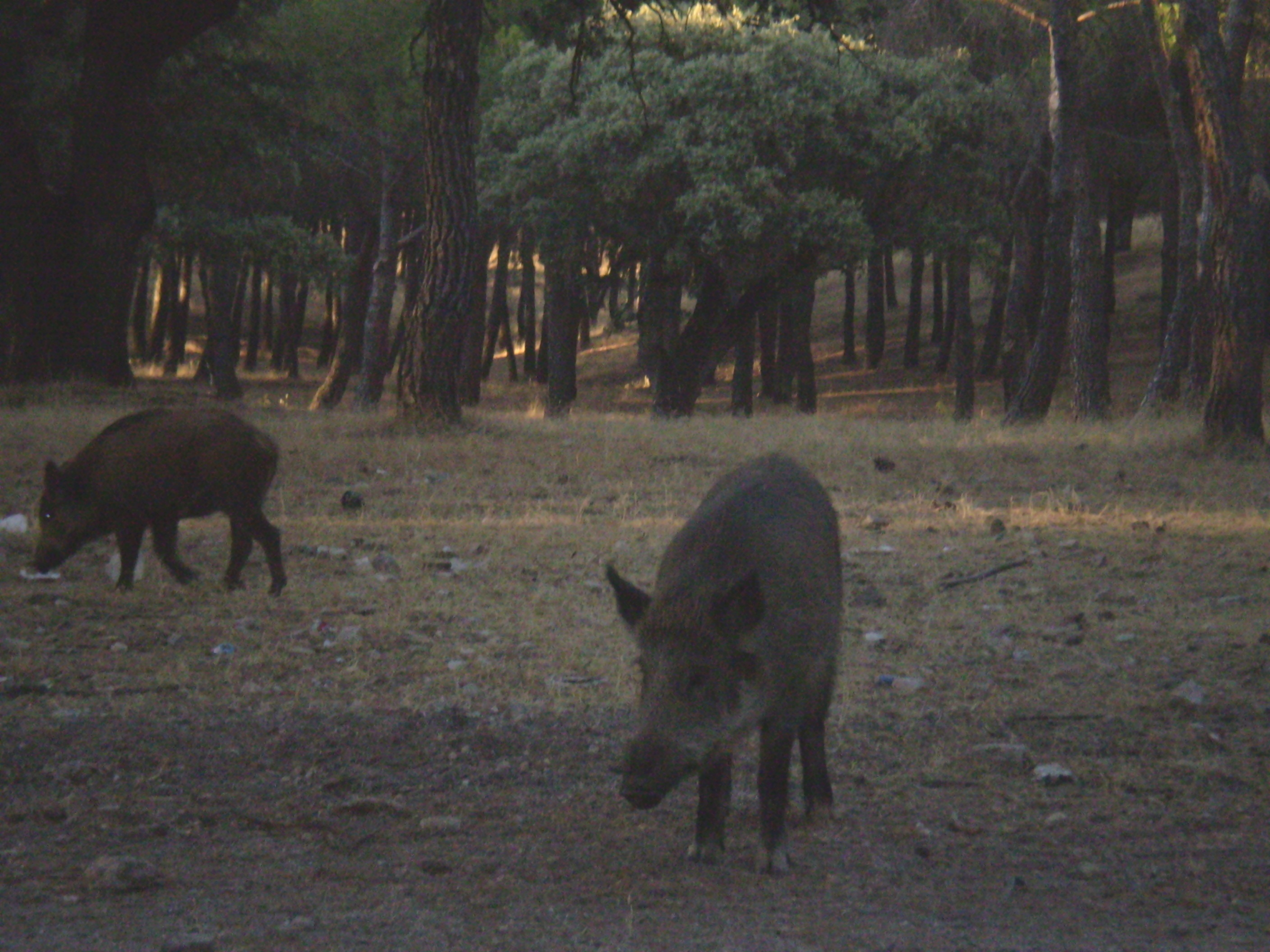 Jabalíes en el Monte de El Pardo, Madrid, Spain